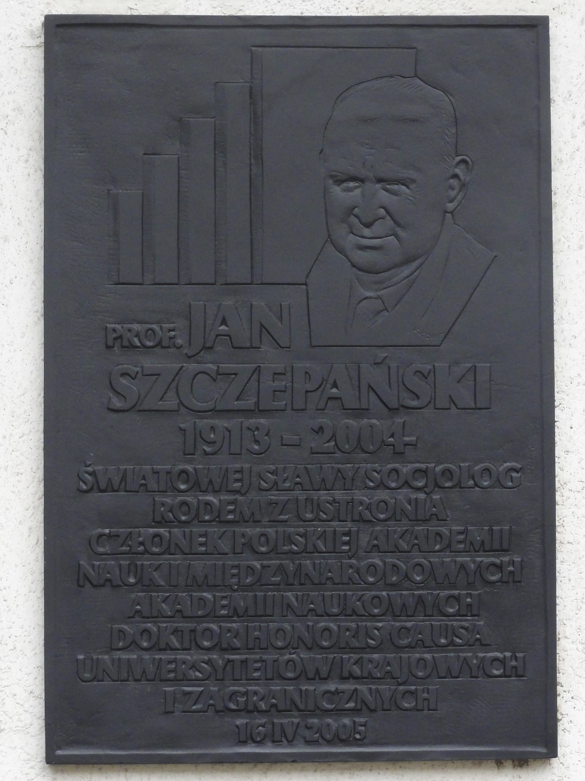 Tabliczka prof. Jana Szczepańskiego na budynku Muzeum Ustrońskiego